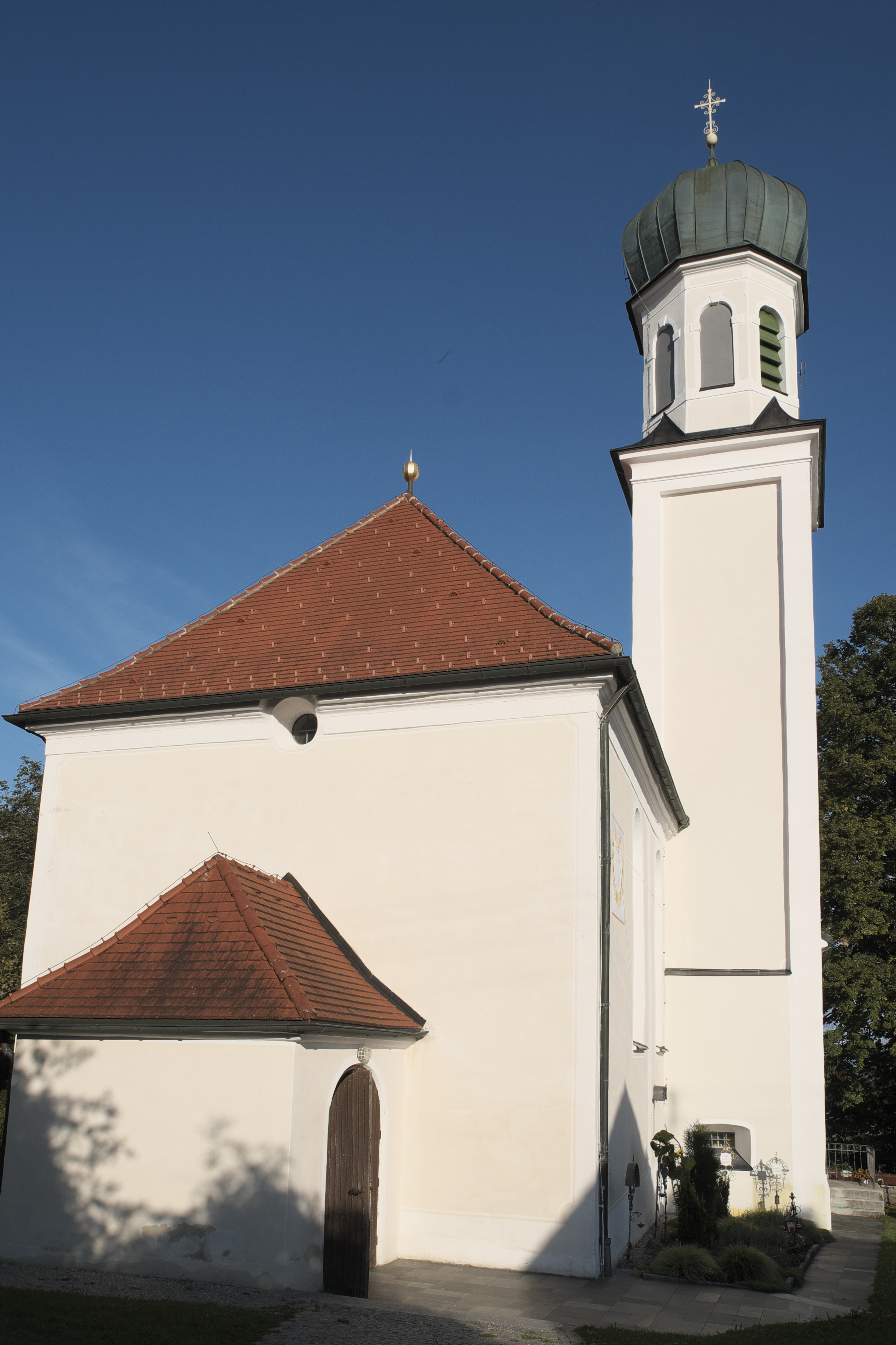 Katholische Pfarrkirche St. Martin in Sachsenried (Schwabsoien) im Landkreis Weilheim-Schongau (Bayern/Deutschland)